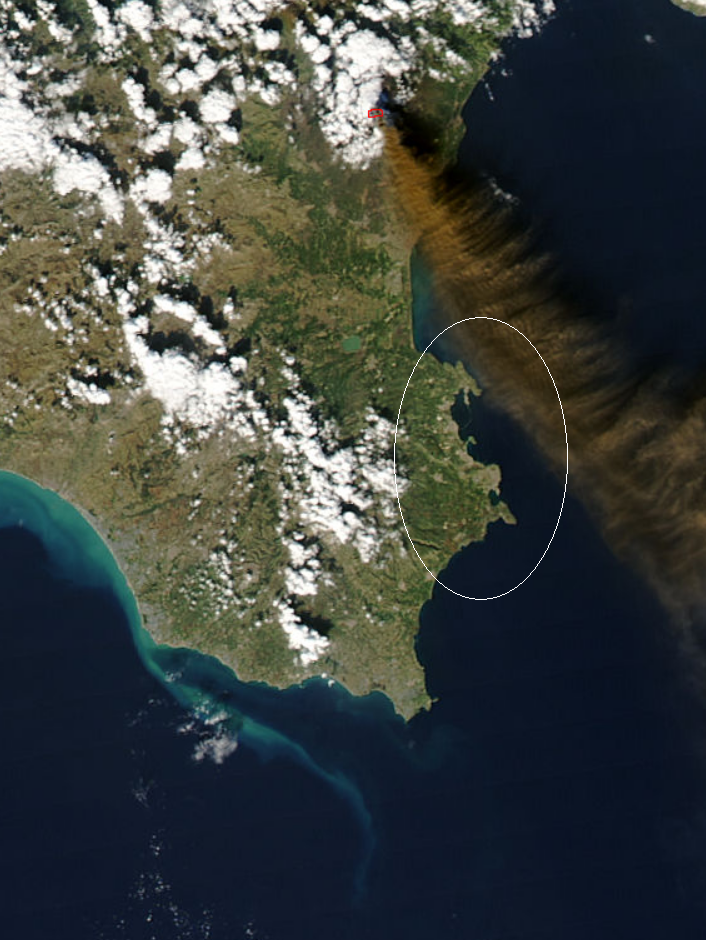 La costa della Sicilia sud-orientale ripresa dal satellite durante un'eruzione dell'Etna; cerchiata di bianco il tratto di costa siracusana. Questa immagine è derivata da